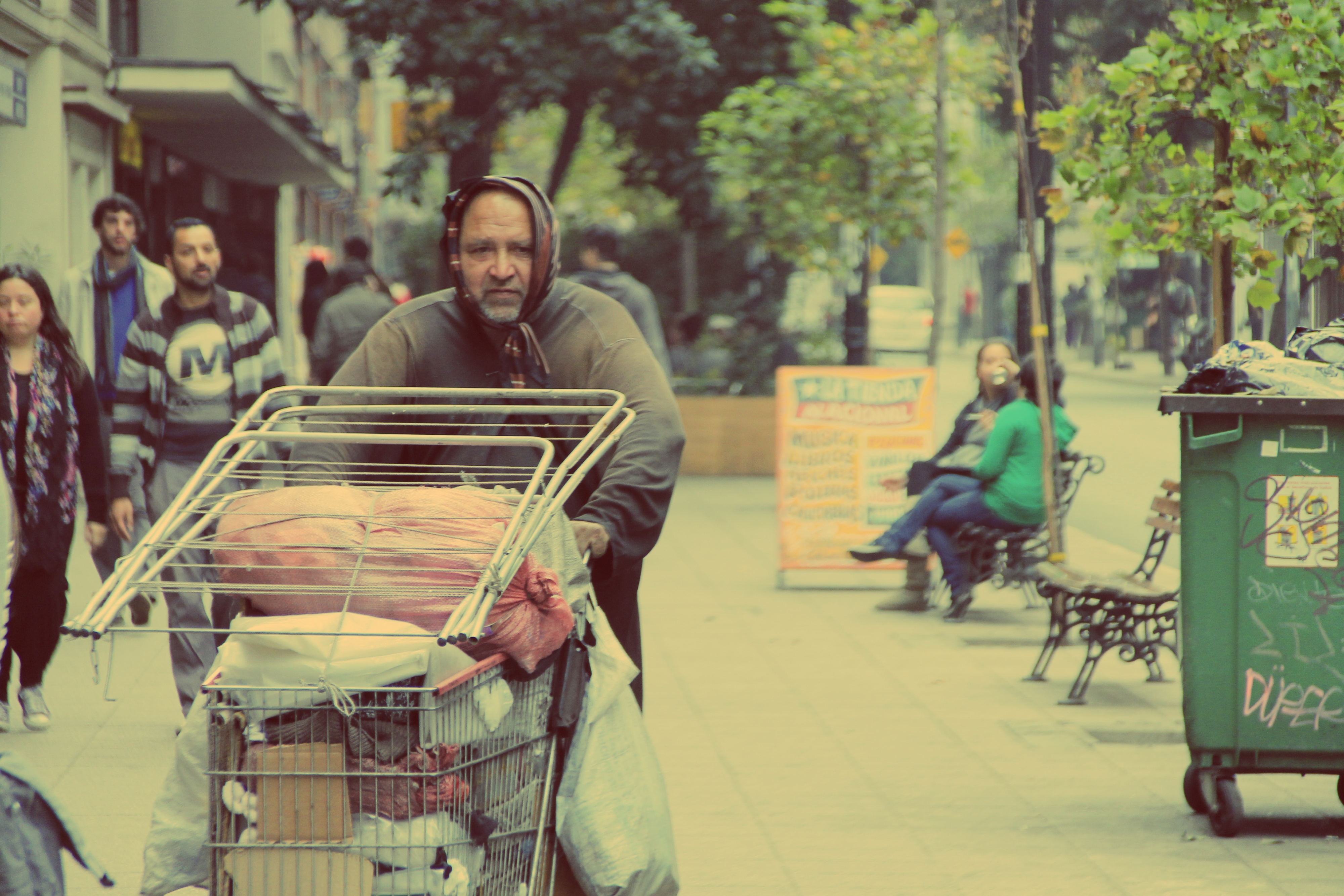 José Pizarro Caravantes (1953-2017) el "Divino Anticristo" Personaje icónico de las calles santiaguinas con su "carrísimo" en 2012